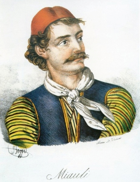 Ανδρέας Μιαούλης. Εγχρωμη λιθογραφία. Giovanni Boggi.